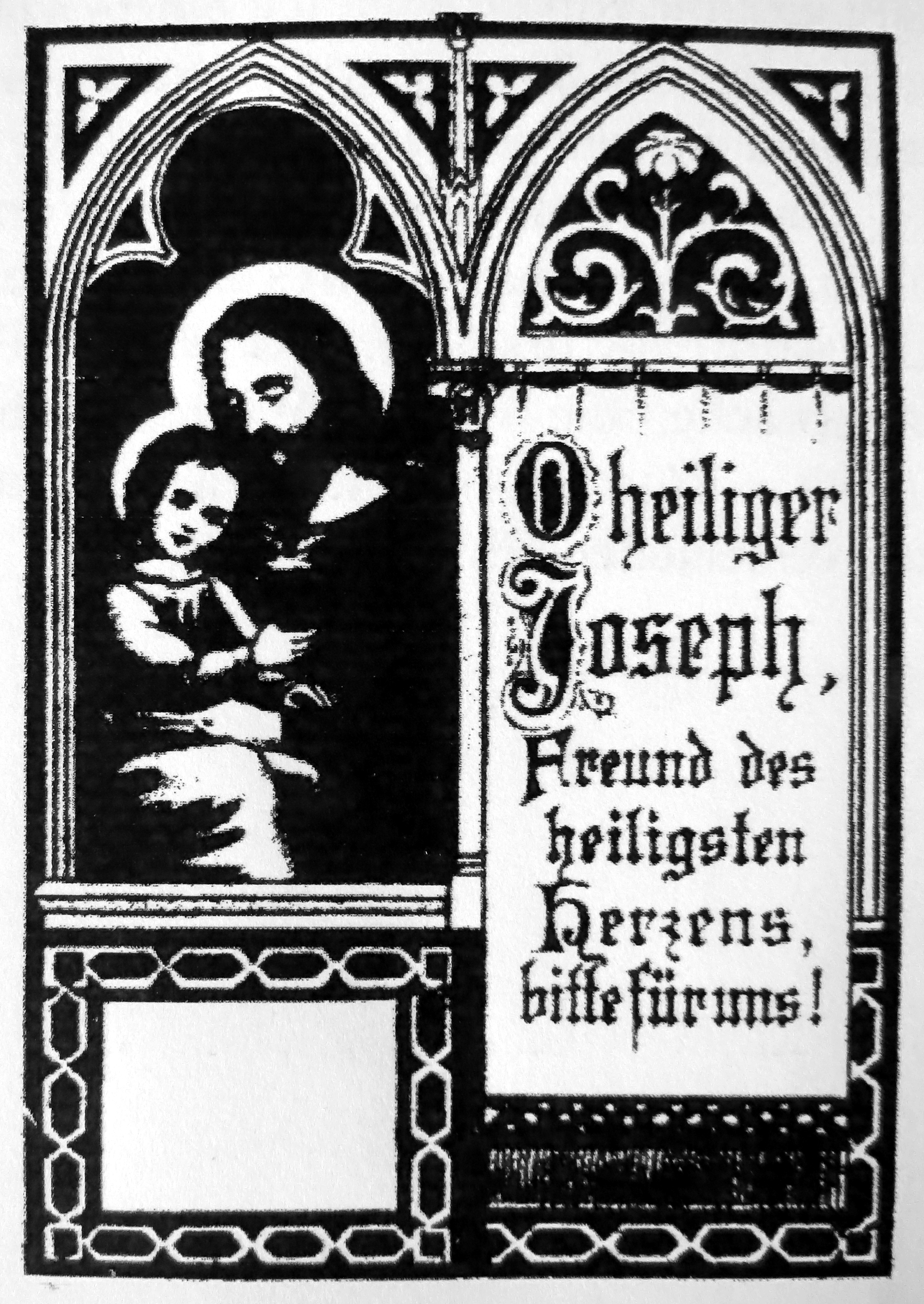 St. Josef-Kirche, Köpenick